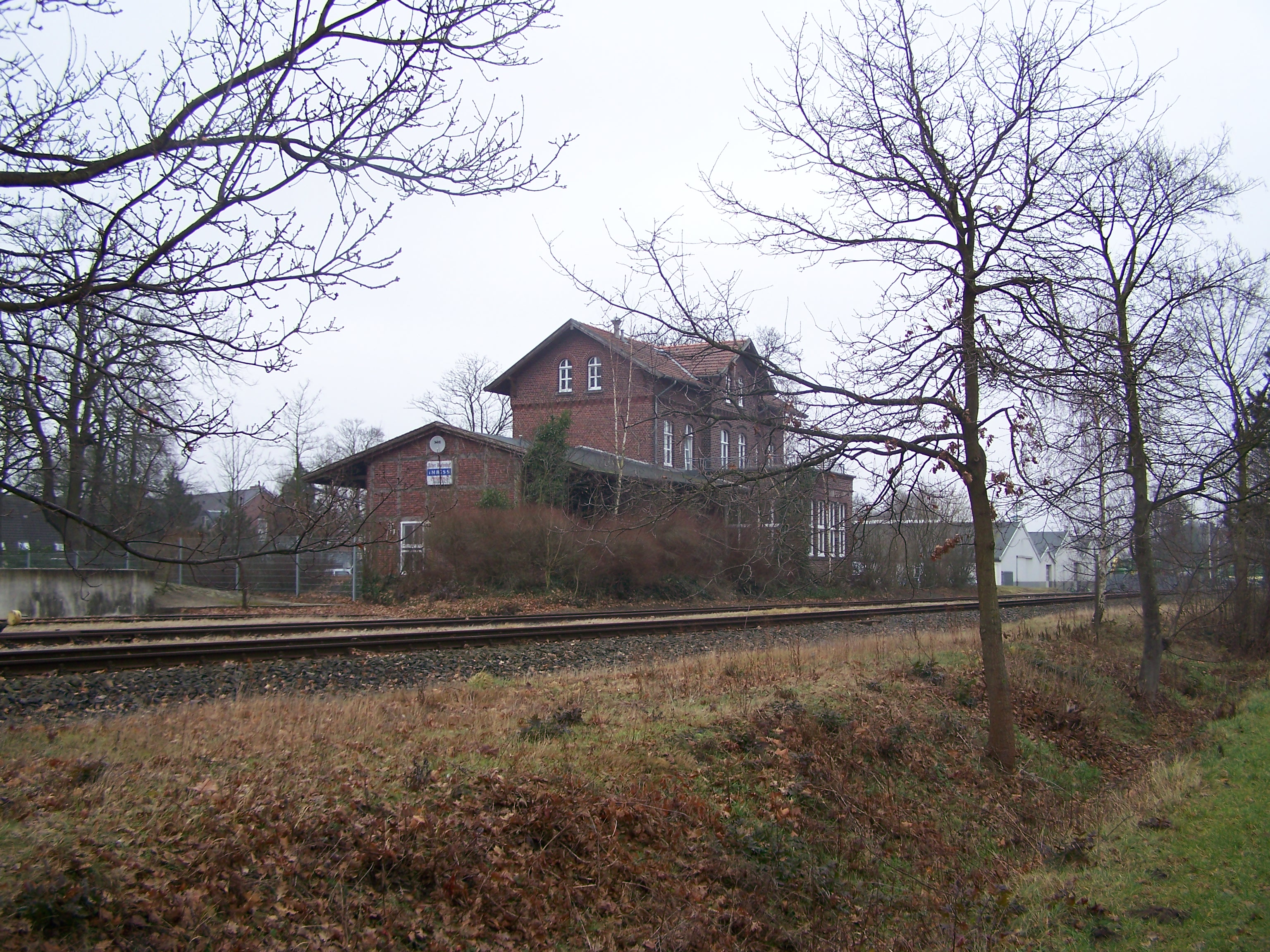 Bahnhof Spelle, Niedersachsen, Deutschland.